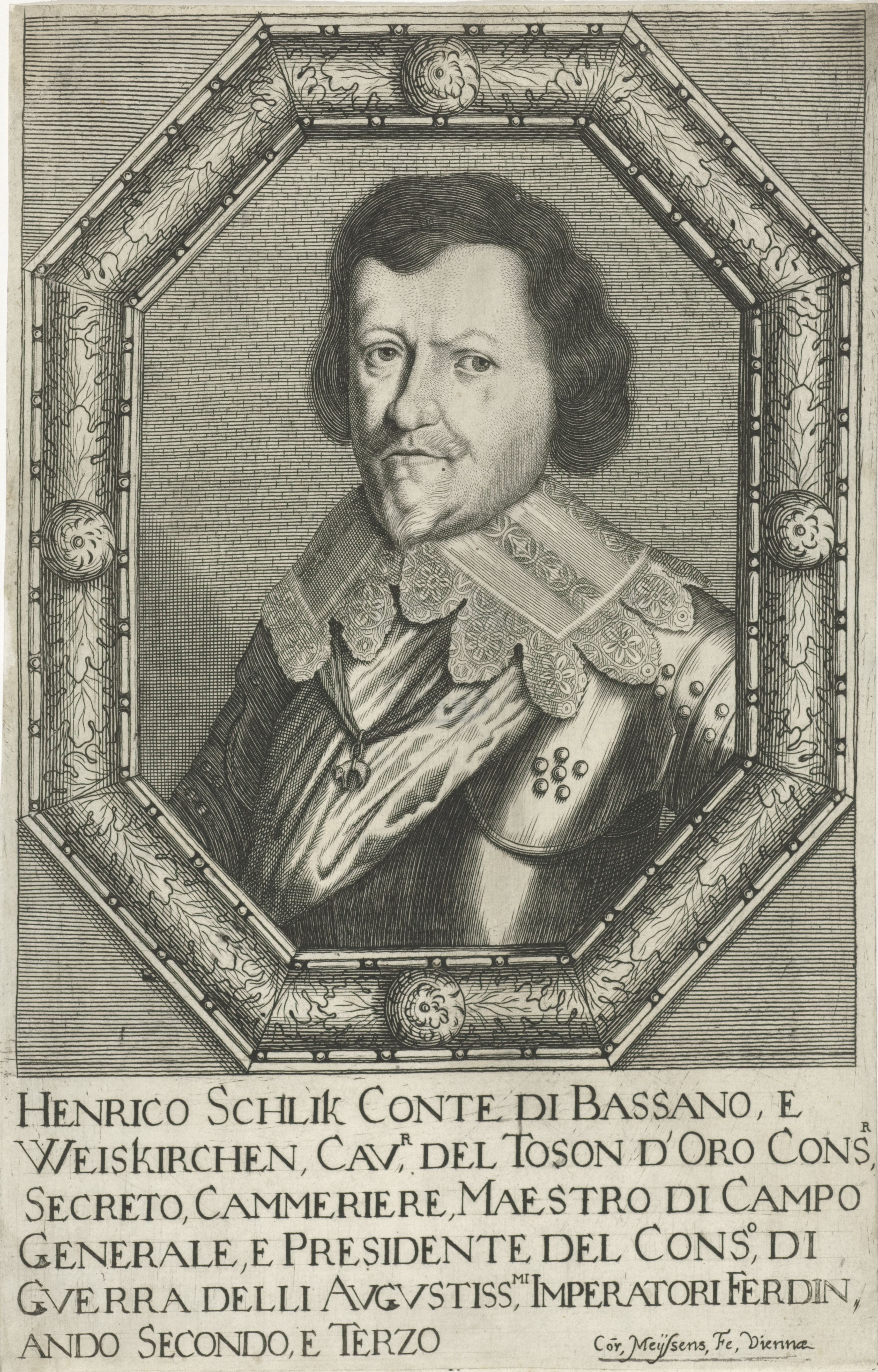 IdentificatieTitel(s): Portret van Heinrich SchlickObjecttype: prent Objectnummer: RP-P-1938-663Opschriften / Merken: verzamelaarsmerk, verso, gestempeld: (twee maal)Lugt 2228Omschrijving: Portret van Heinrich Schlick, graaf van Bassano en Weisskirchen. Om zijn hals een ketting met het ordeteken van de Orde van het Gulden Vlies. Onderaan in de marge zijn titel en functie in het Italiaans.VervaardigingVervaardiger: prentmaker: Cornelis Meyssens (vermeld op object)uitgever: Giovanni Battista Hacque (mogelijk)Plaats vervaardiging: WenenDatering: 1670 - 1674Fysieke kenmerken: gravureMateriaal: papier Techniek: graveren (drukprocedé)Afmetingen: plaatrand: h 244 mm × b 156 mmToelichtingPrent mogelijk gebruikt in: Gualdo Priorato, Galeazzo. Historia di Leopoldo Cesare, (...). 3 dln. Wenen, Giovanni Battista Hacque, 1670-1674.OnderwerpWie: Heinrich SchlickVerwerving en rechtenCredit line: Schenking van de heer D.H. Cevat, GuernseyVerwerving: schenking 1938Copyright: Publiek domein